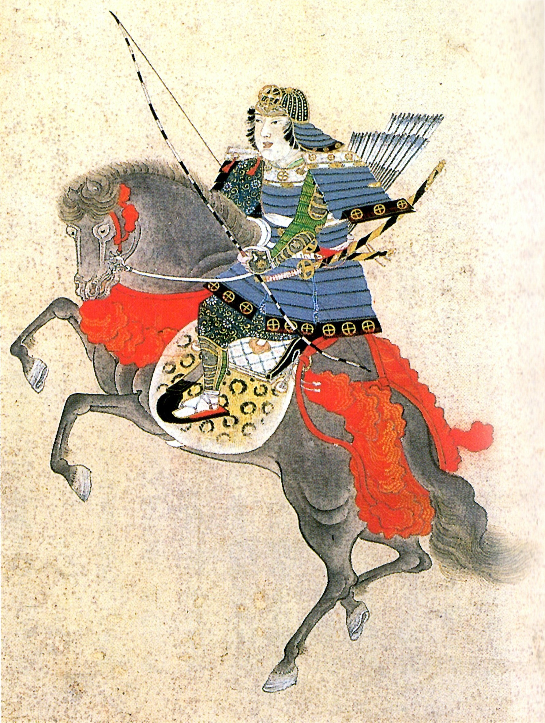 北郷久直の肖像。